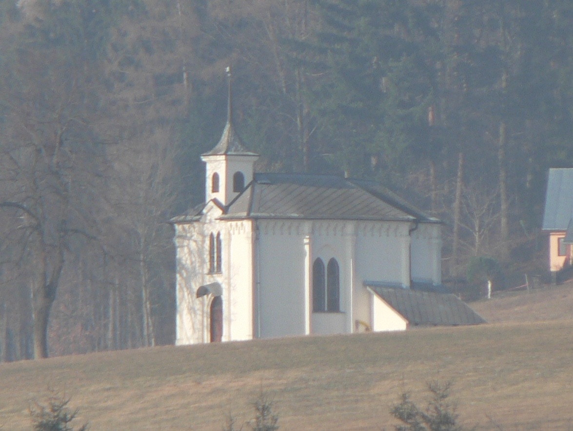 Českobratrská modlitebna (Svébohov)